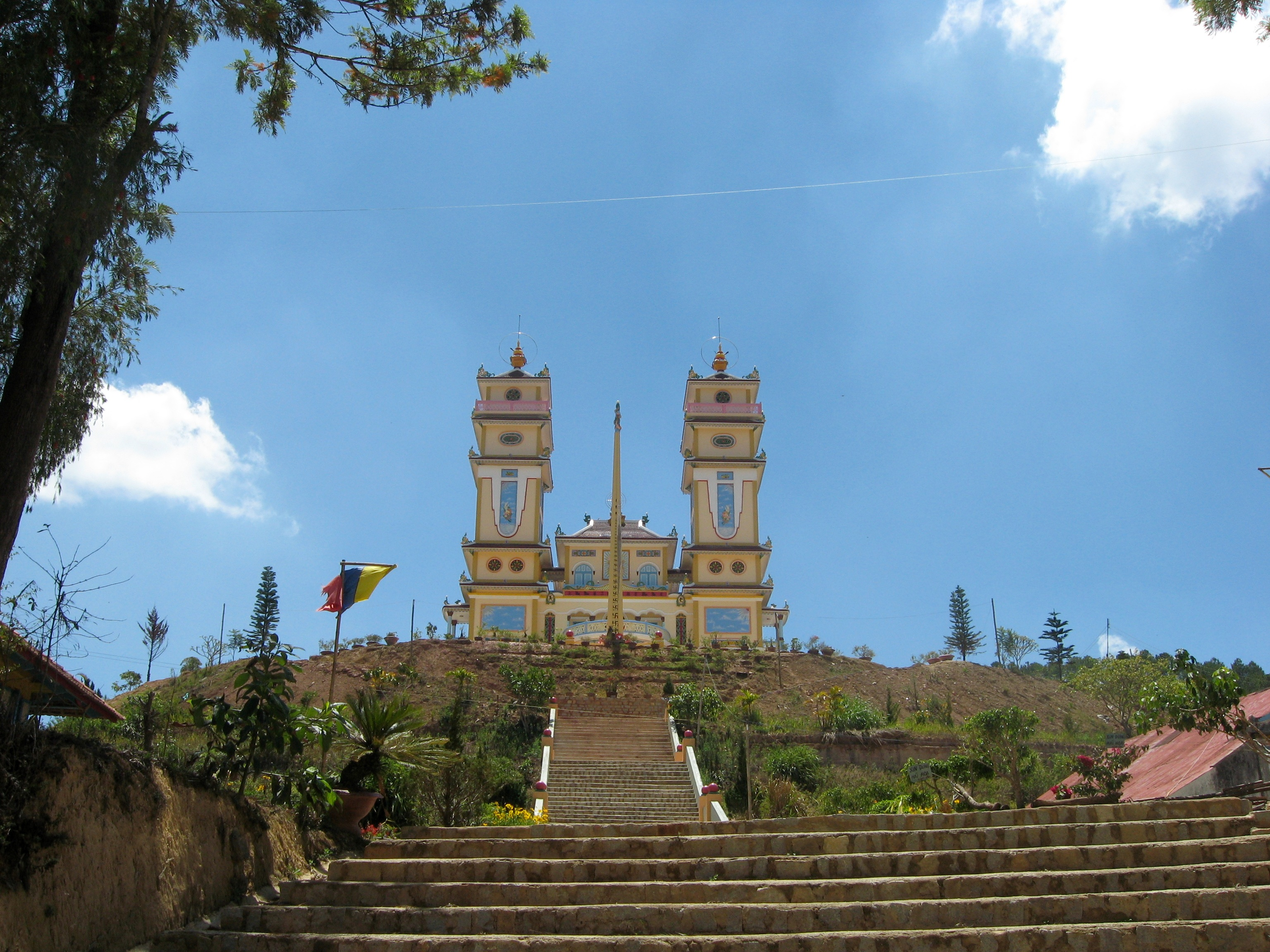 Thanh that Da Phuoc